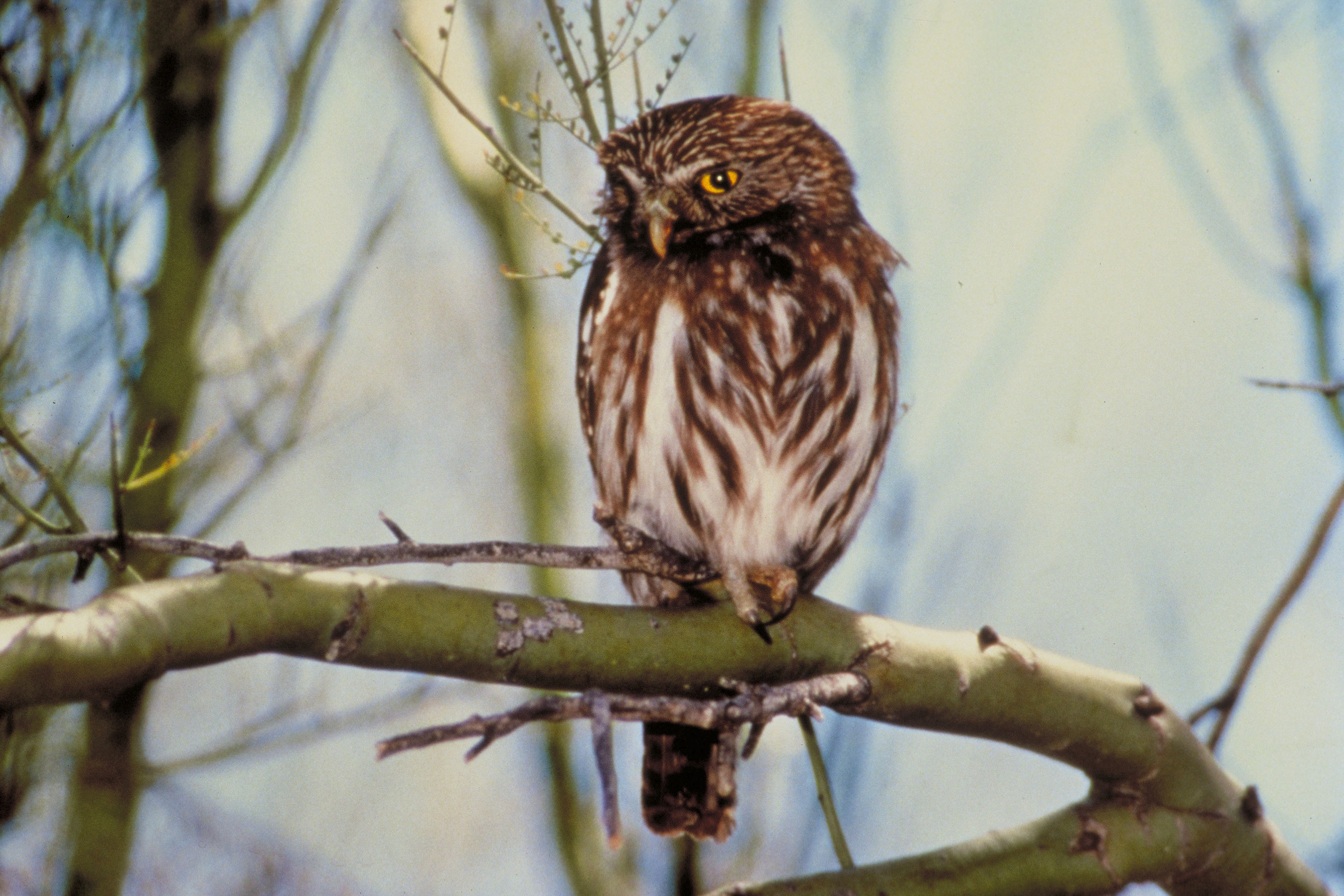 Ferruginous Pygmy Owl Glaucidium brasilianum cactorum WO-8737-30